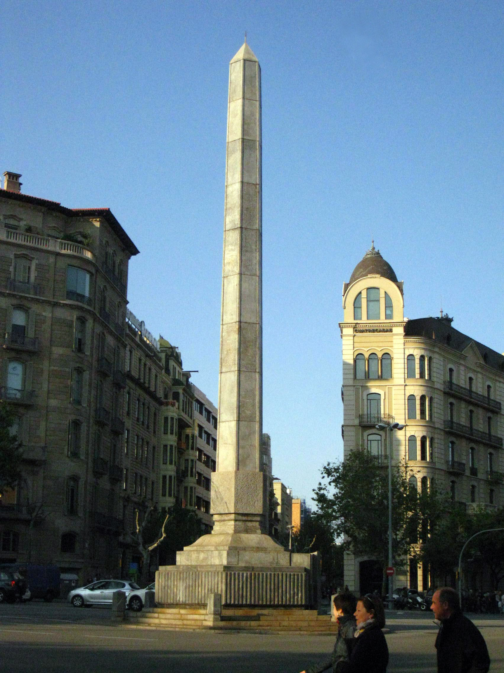 Obelisc. Pl. de Joan Carles I, pg. de Gràcia - av. Diagonal (Barcelona)